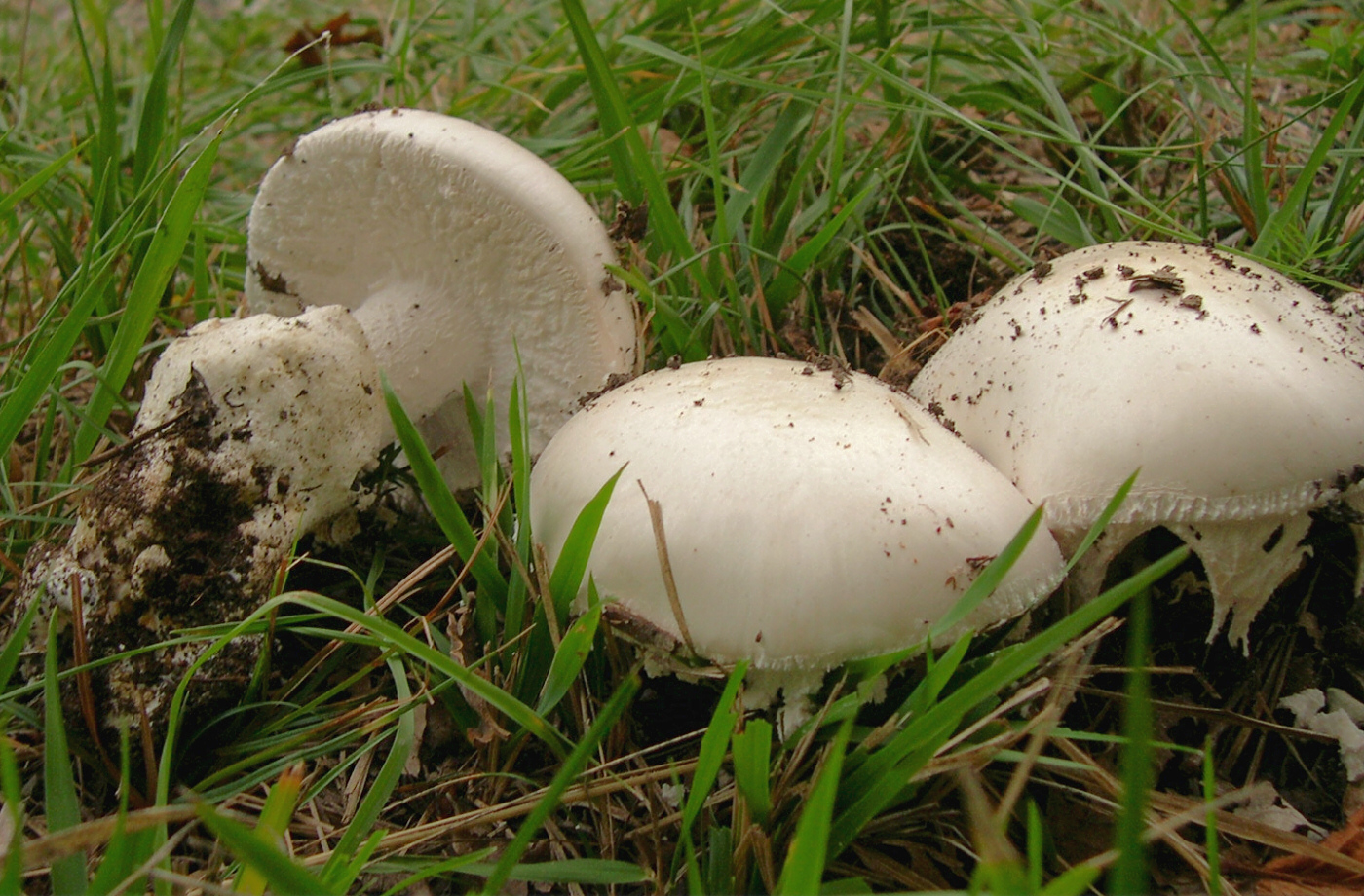 Amanita ovoidea (Bull. : Fr.) Link